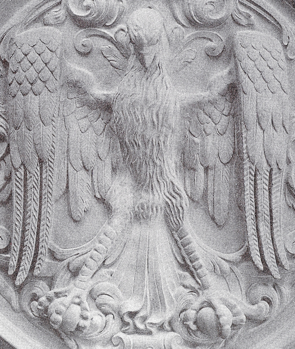 Heilbronn, Altes Rathaus, Großer Ratssaal, Adler an der Decke